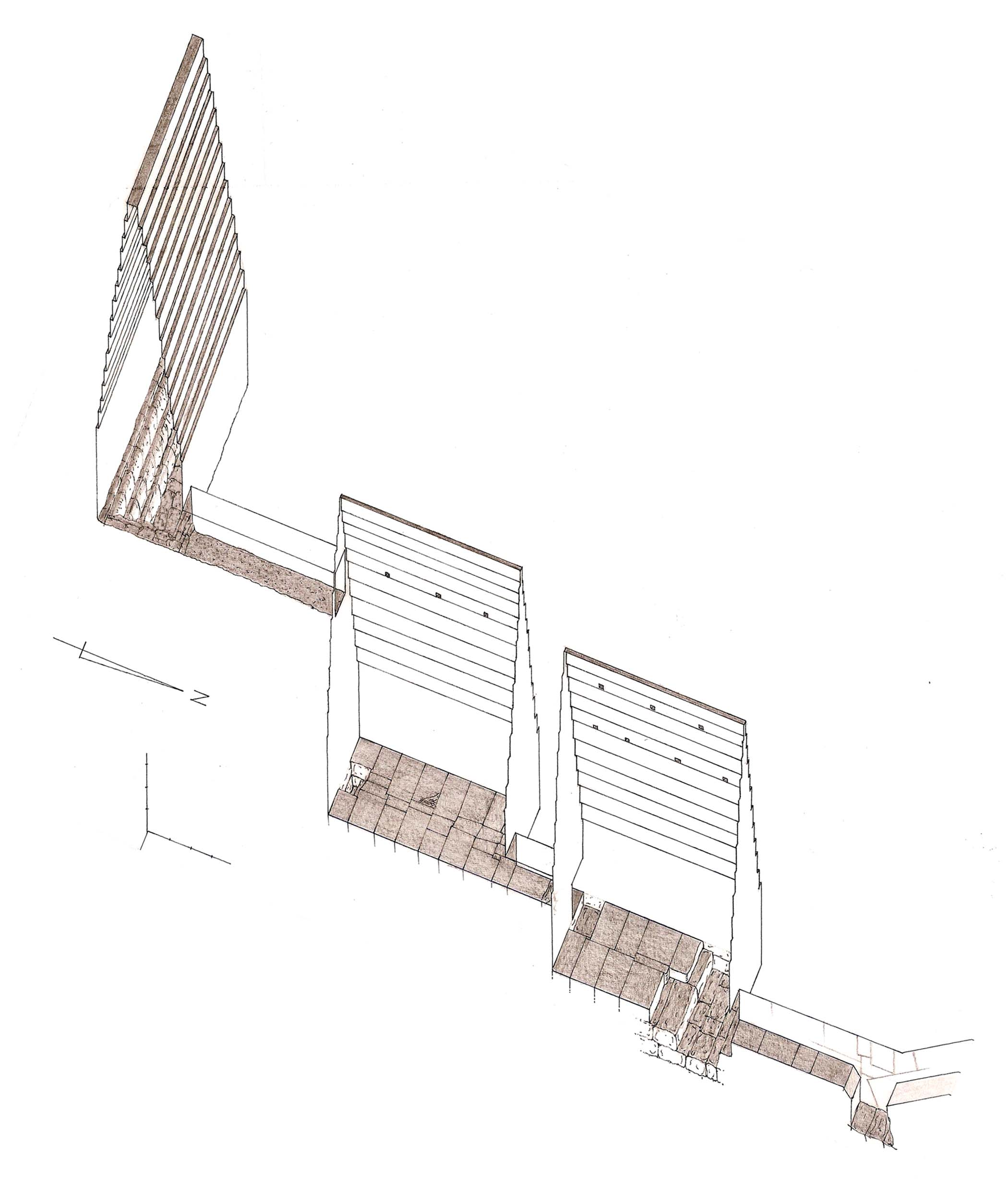 Vue axonométrique des appartements funéraires de la pyramide rouge à Dahchour